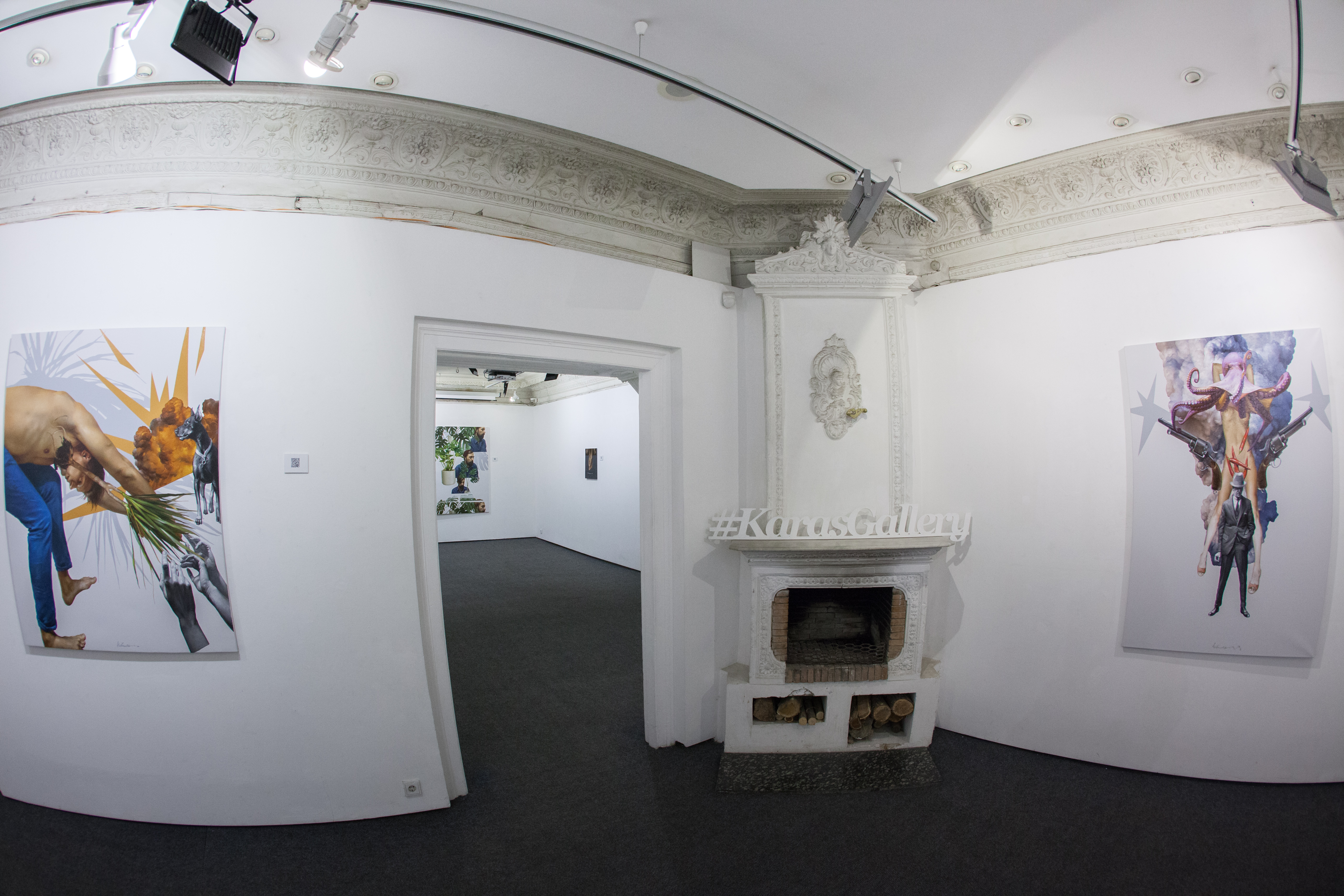 Karas Gallery Карась Галерея Юрій Коваль проект "Проявлення"